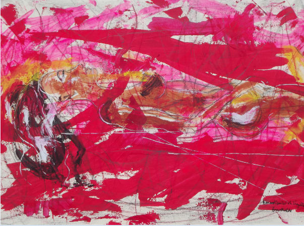 2012, 120/90 cm, Acrylique